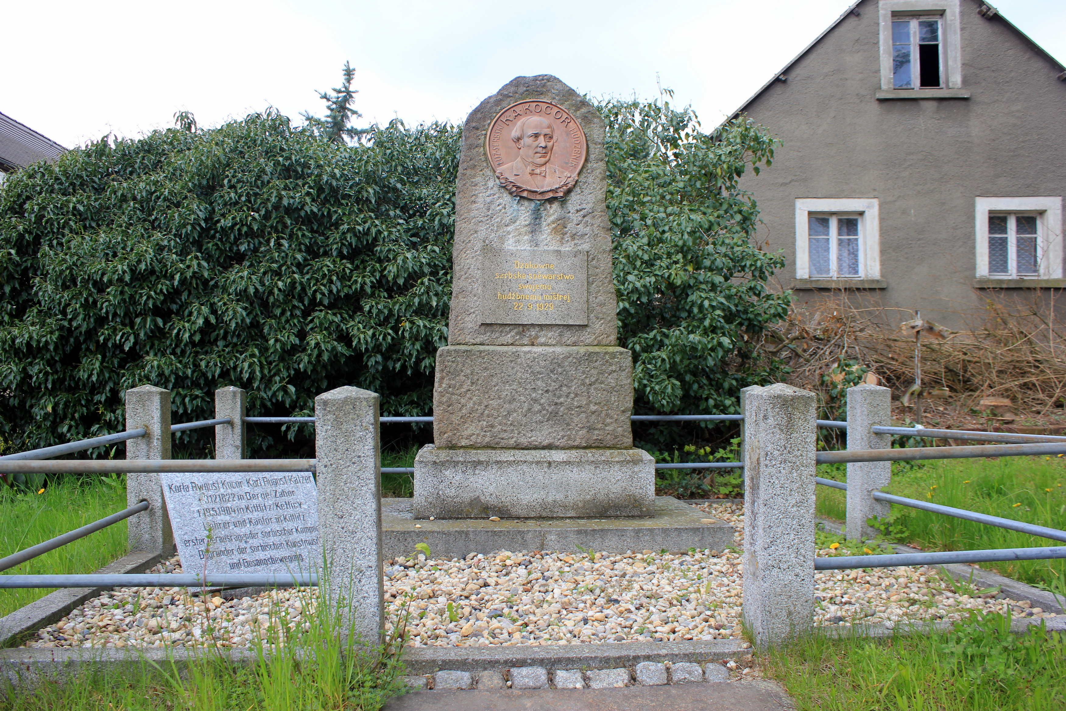 Hornjoserbsce: Pomnik za Korlu Awgusta Kocorja w Zahorju pola Budestec.